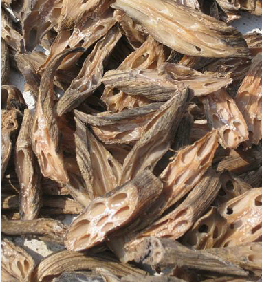 Jingtang Lotus Root's Storage